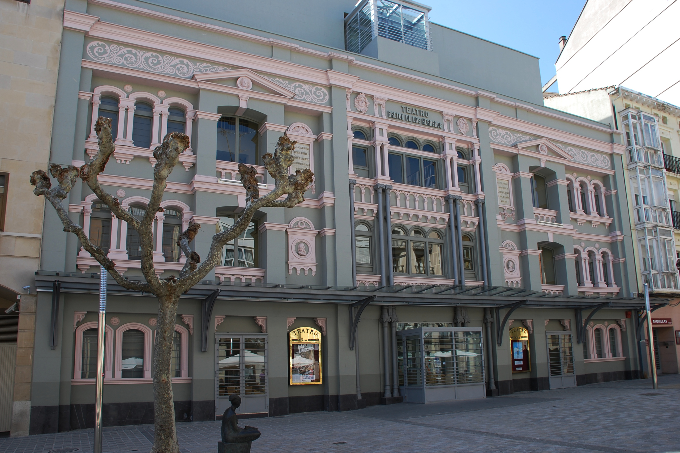 Teatro Bretón de los Herreros en Logroño, La Rioja (España).